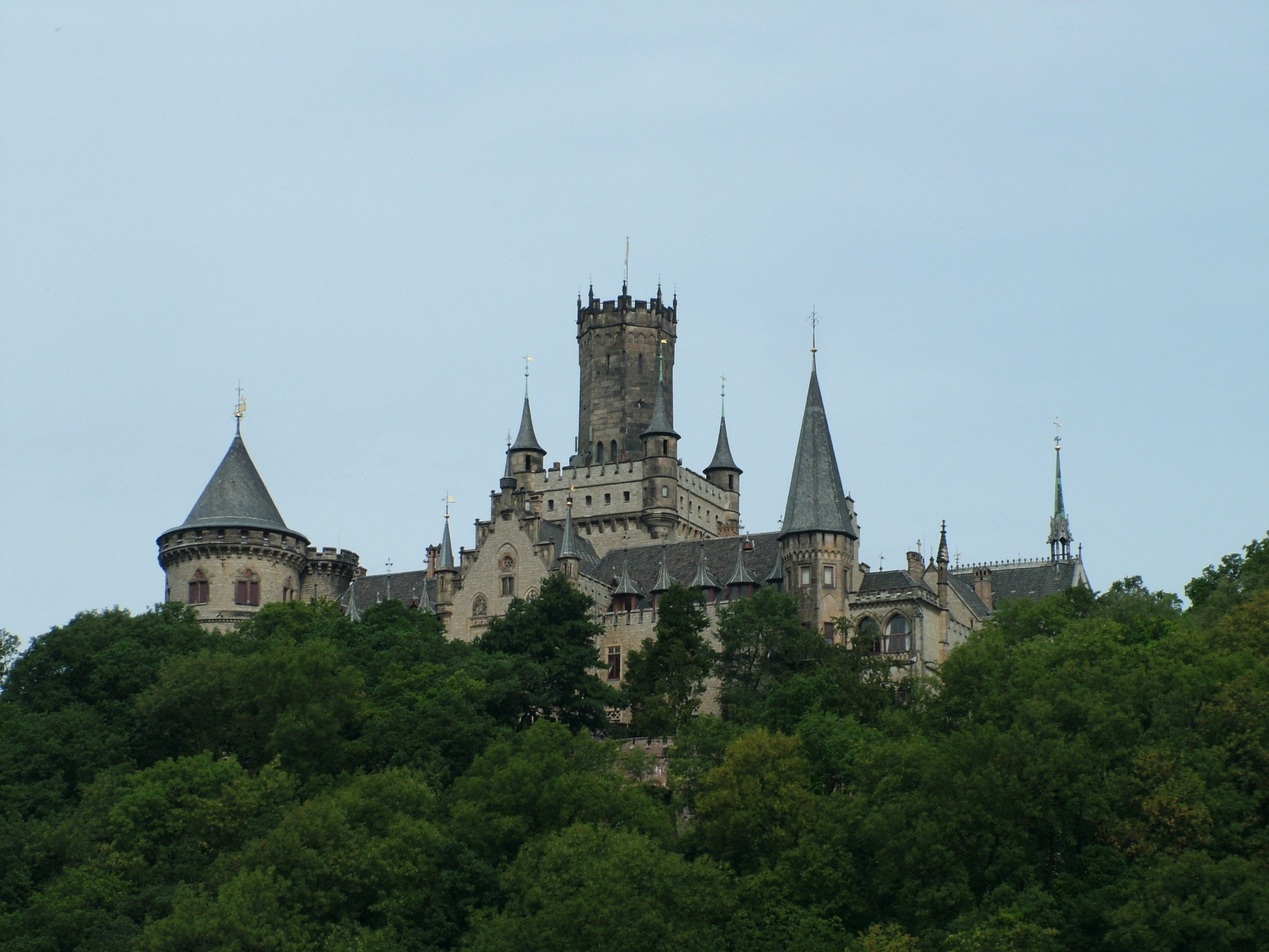 Schloss Marienburg von Nordstemmen (bei Pattensen, Niedersachsen) aus